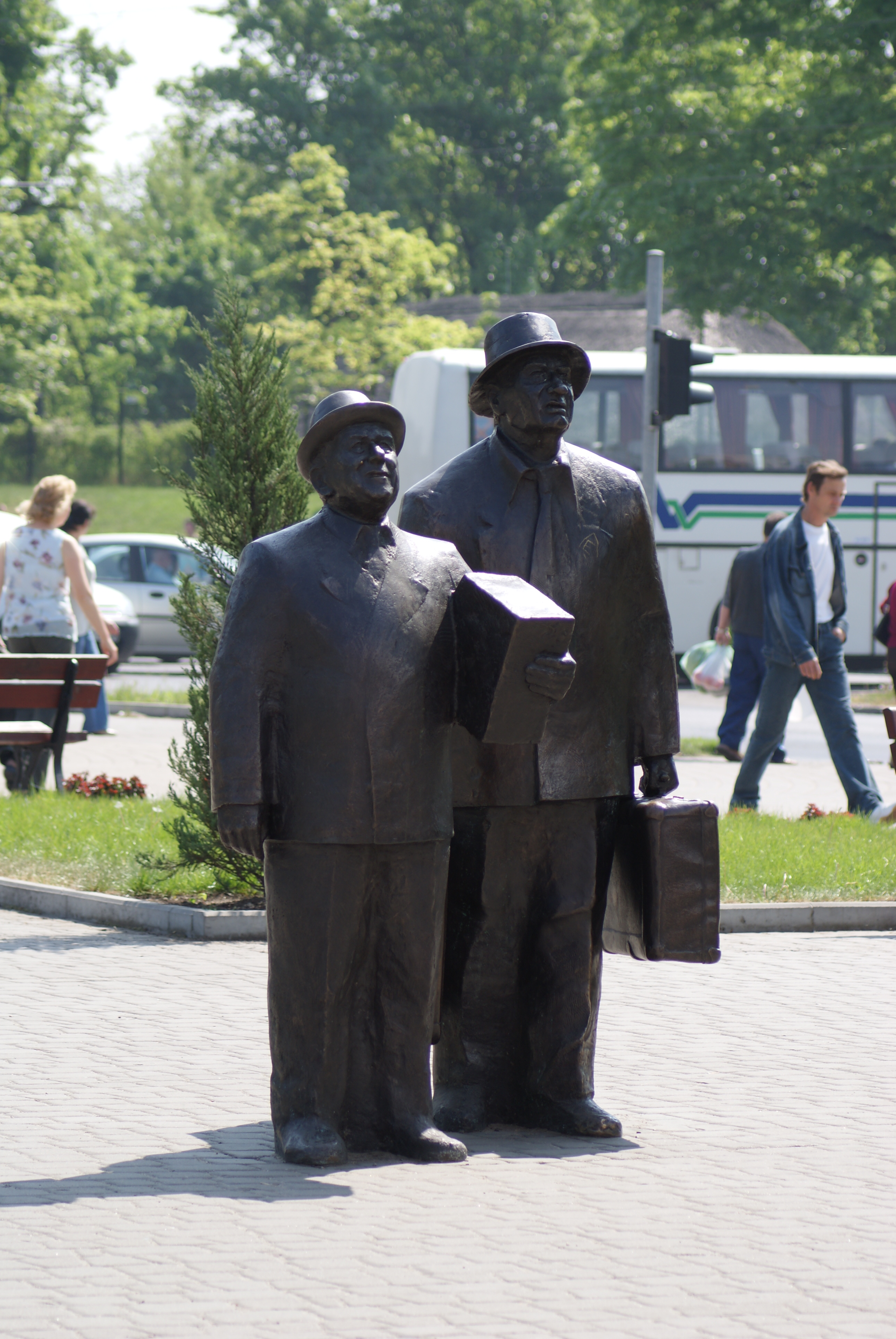 Pomnik Kargula i Pawlaka przed CinemaCity w Toruniu, 2007